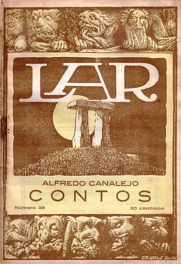 38 Contos. Alfredo Canalejo. Lar. 1927.jpg